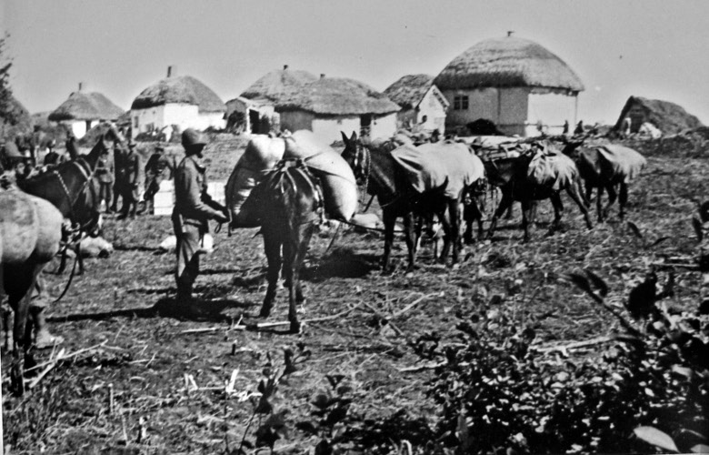 Interno di un Kolkoz o Kolchoz